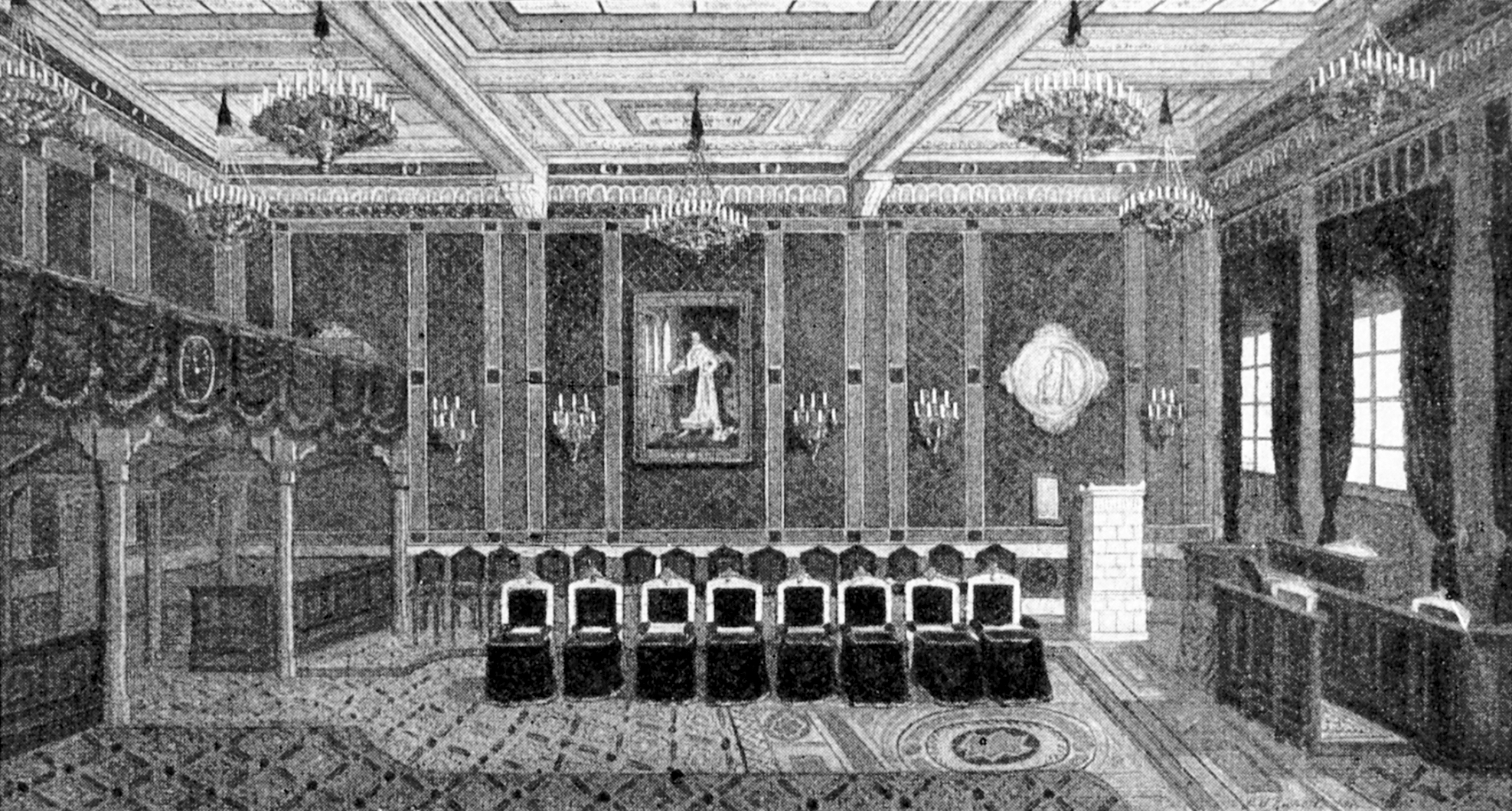 Sitzungssaal der Kammer der Reichsräte im alten Ständehaus zu München